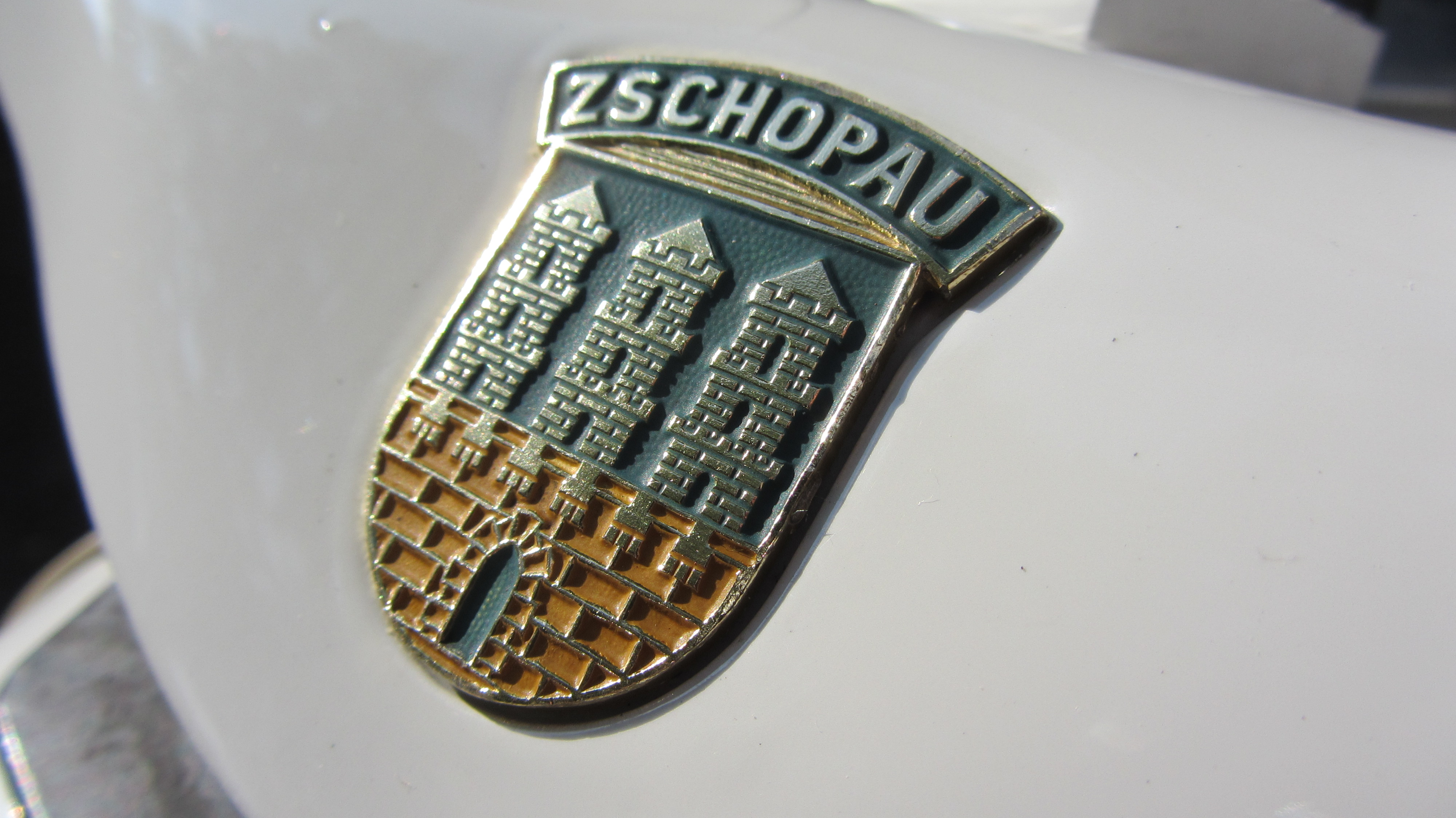 Stadtwappen Zschopau an einer MZ ES 150 1967 Produktionsstandort der Marke "Motorenwerke Zschopau"